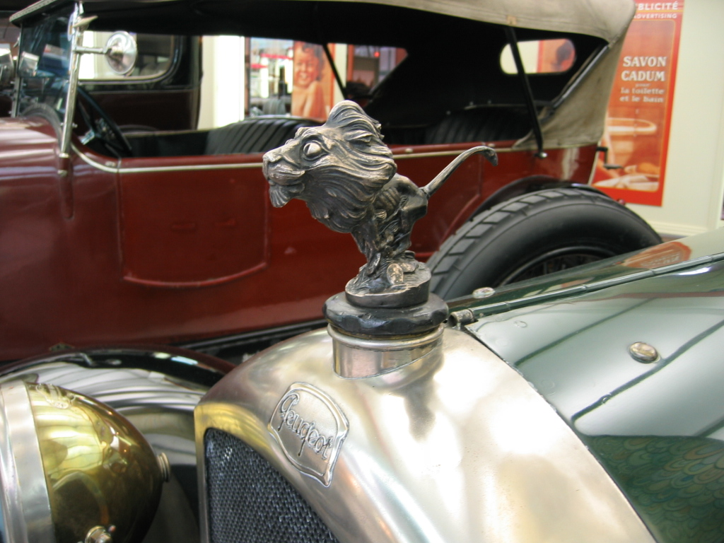 Peugeot Type 153 - Musée Peugeot Sochaux